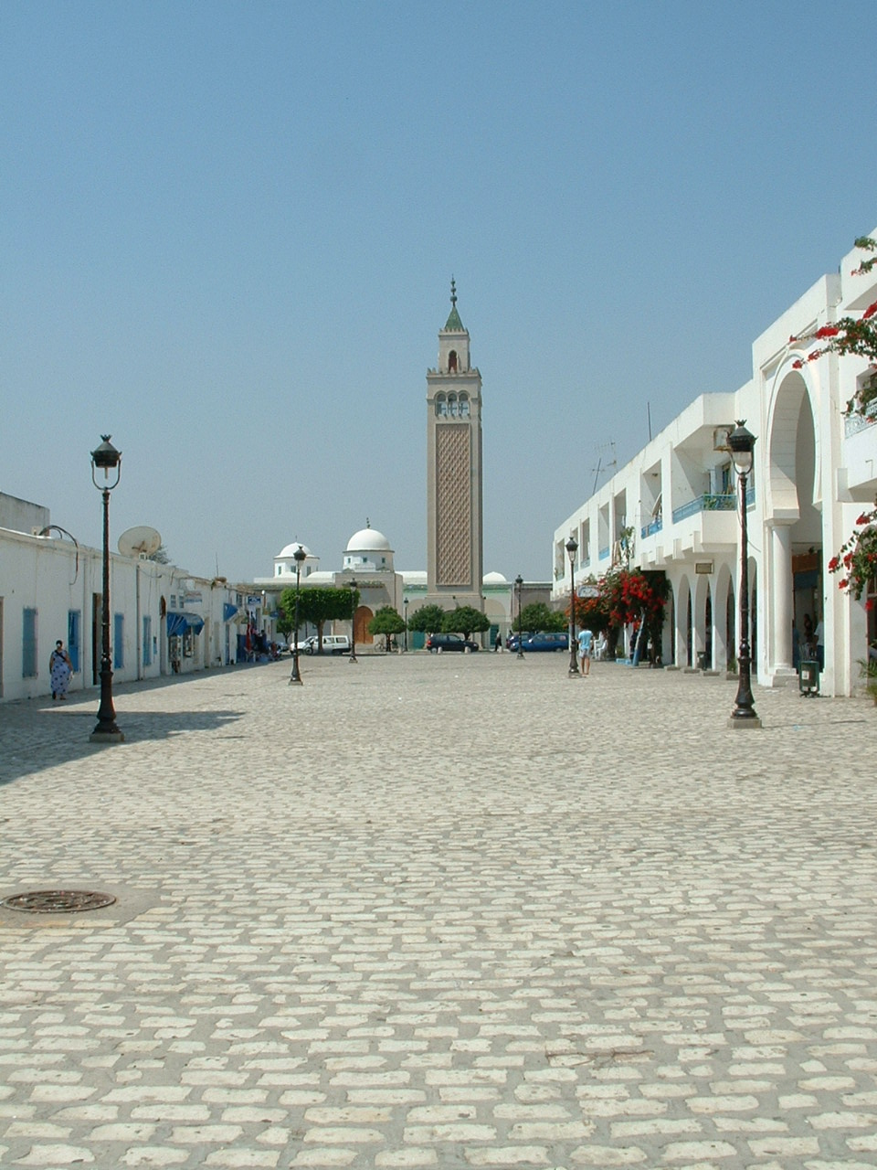 Photographie personnelle prise à La Marsa (Tunisie). La ruelle piétonne mène à la mosquée du quartier Saf-Saf, à Marsa plage.